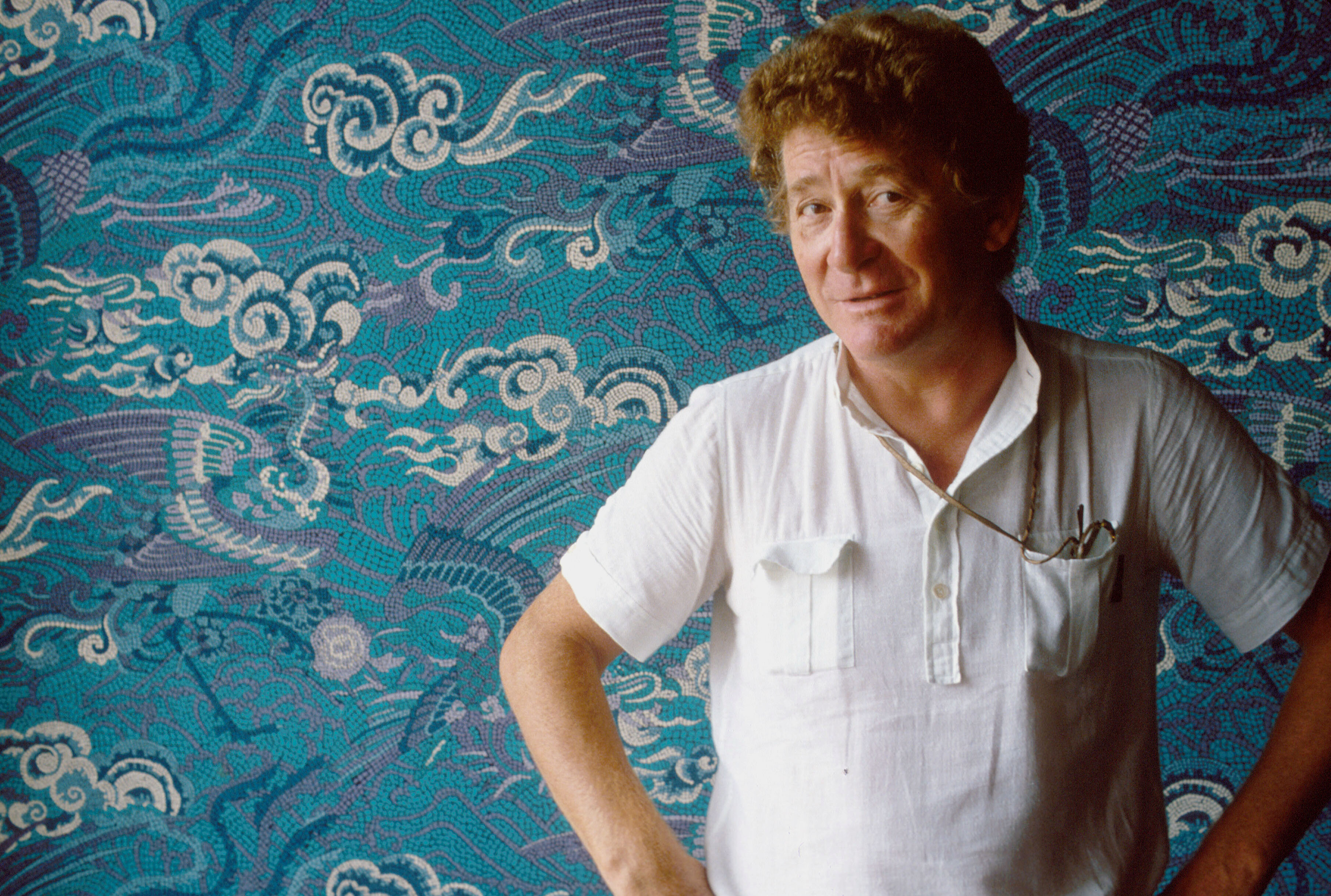 Il regista Ermanno Olmi alla Mostra del cinema di Venezia del 1988